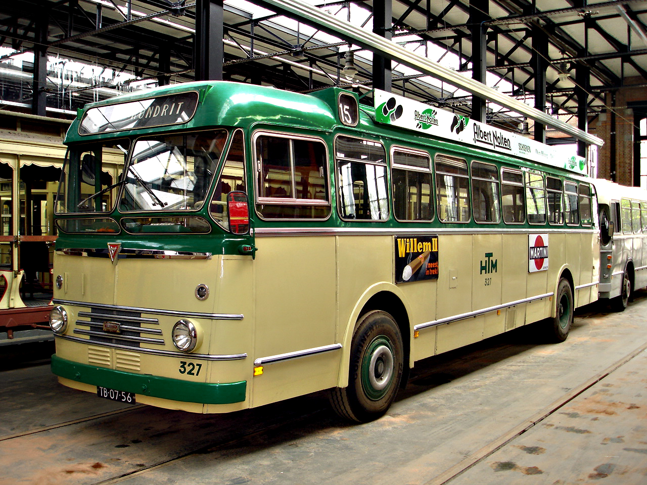 Kromhout 327 HBM Den Haag